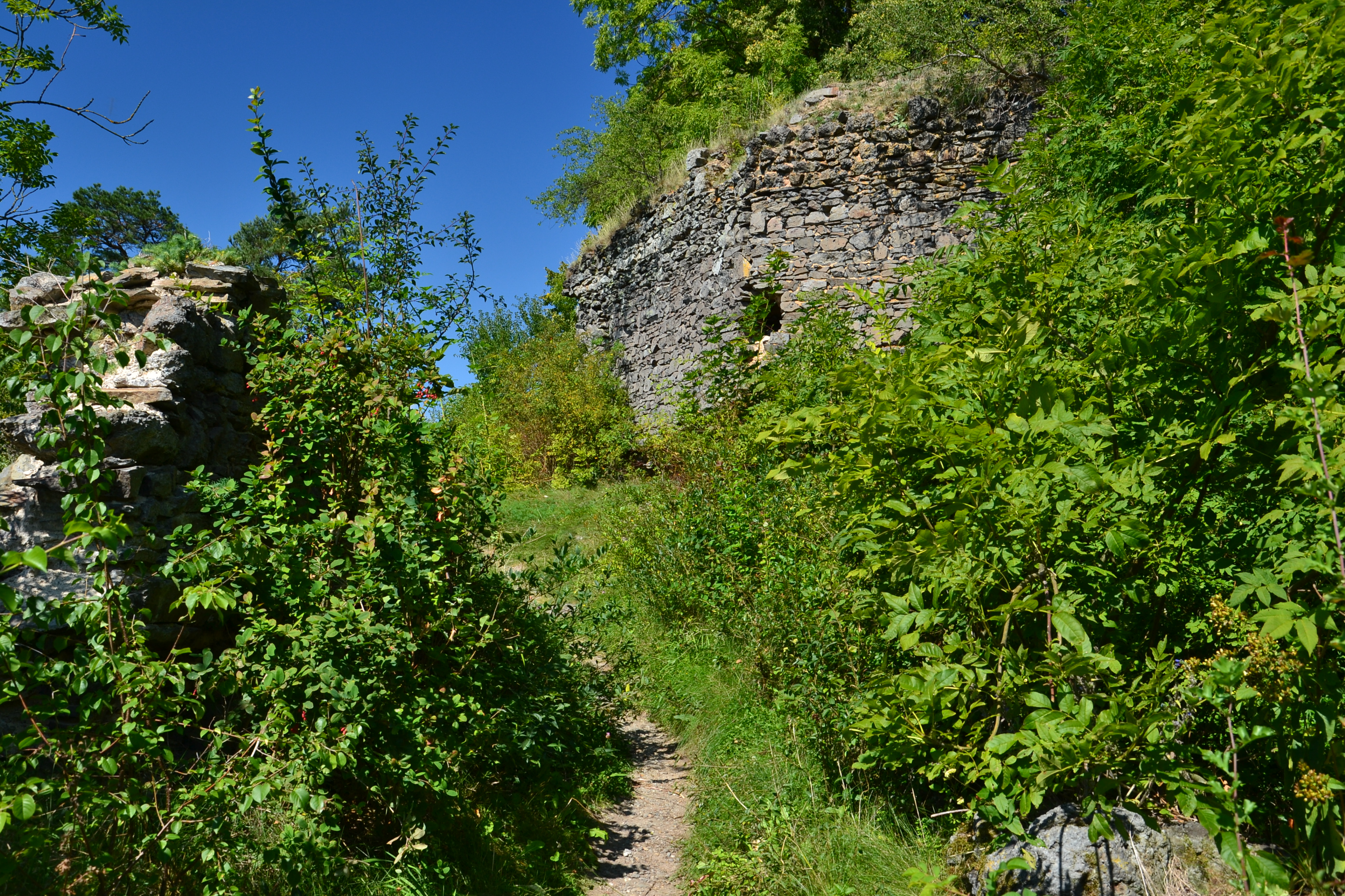 Hrad Preitenstein - prostor druhé brány Nové Městečko (Nečtiny).